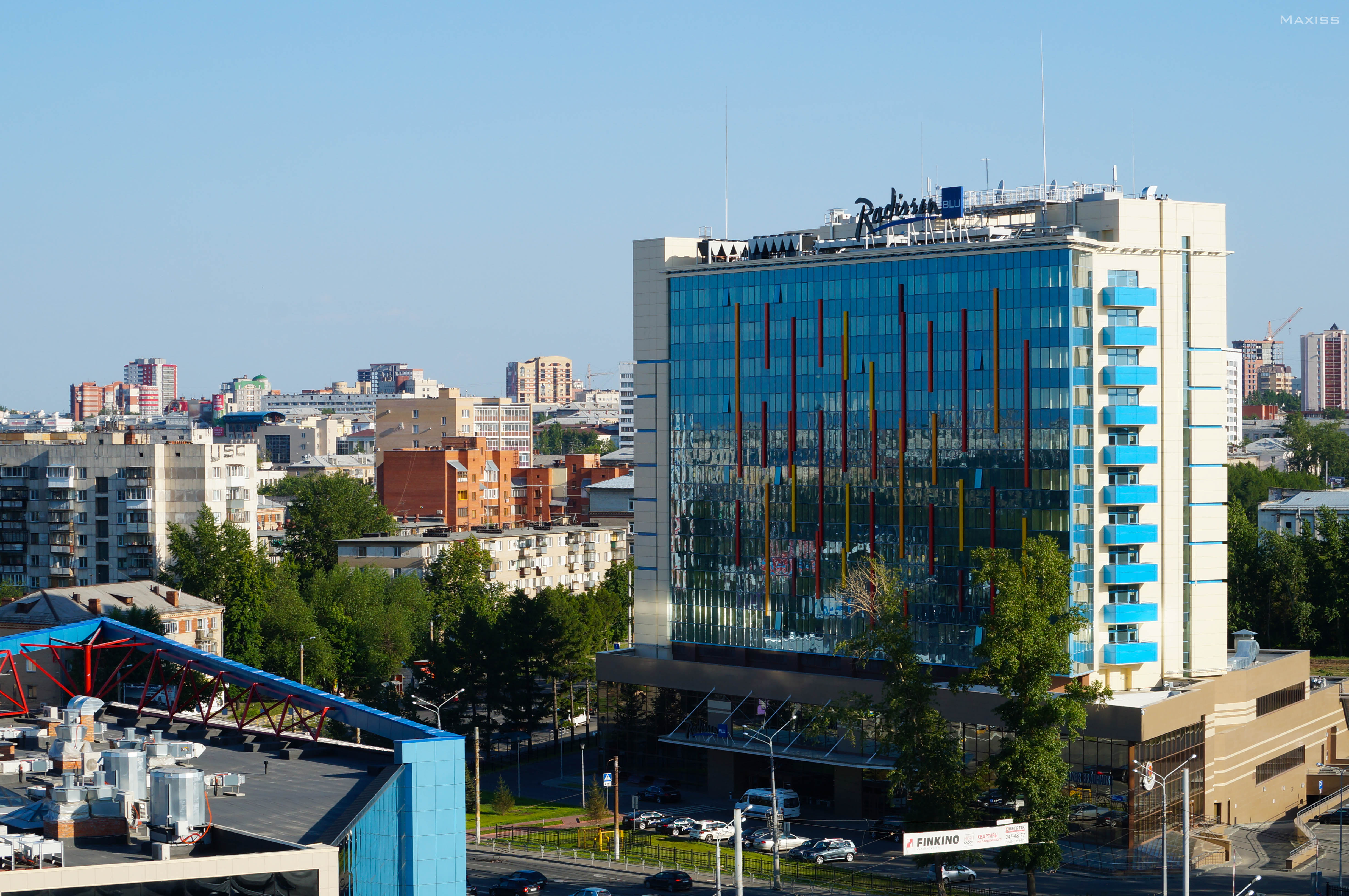 Вид на Radisson Blu с ЖК "Западный Луч"